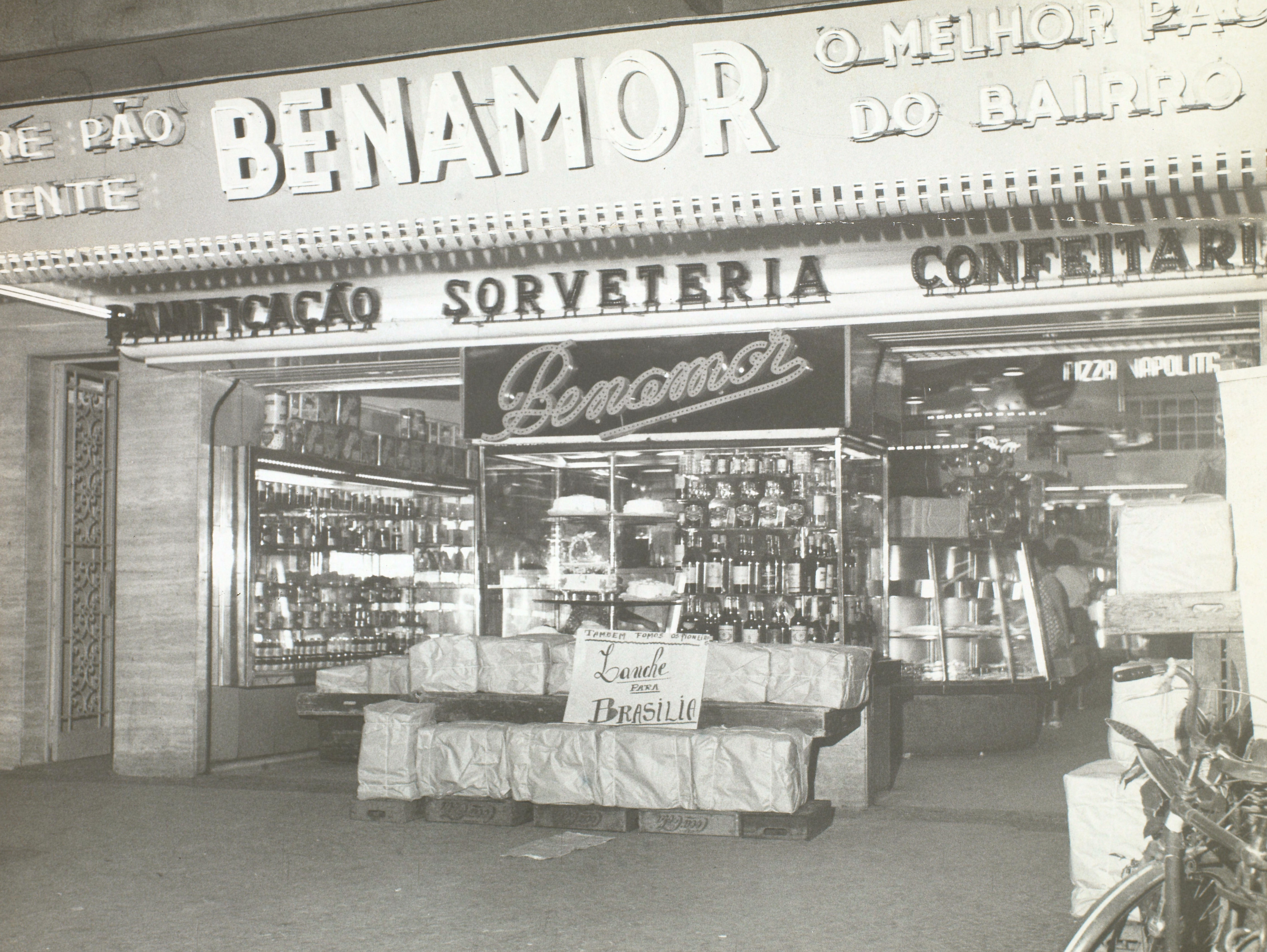 Fotografia do Fundo Correio da Manhã, sob a guarda do Arquivo Nacional.